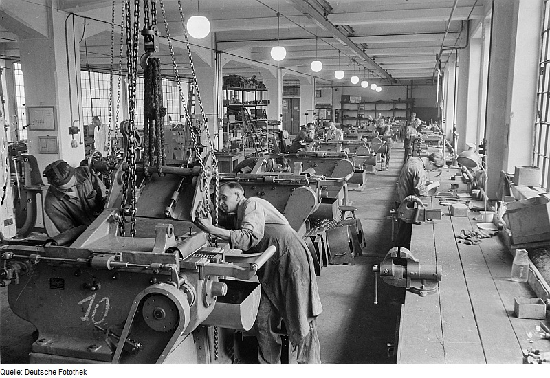 Original image description from the Deutsche Fotothek Montagehalle einer Maschinenfabrik